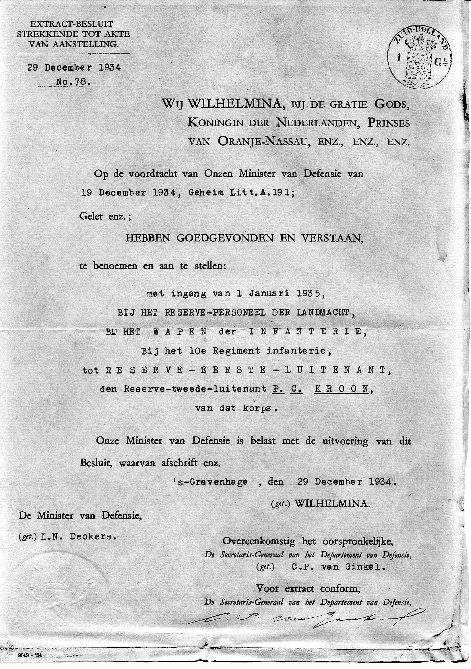 Akte tot aanstelling en benoeming van Pieter Casper Kroon tot reserve-tweede-luitenant.